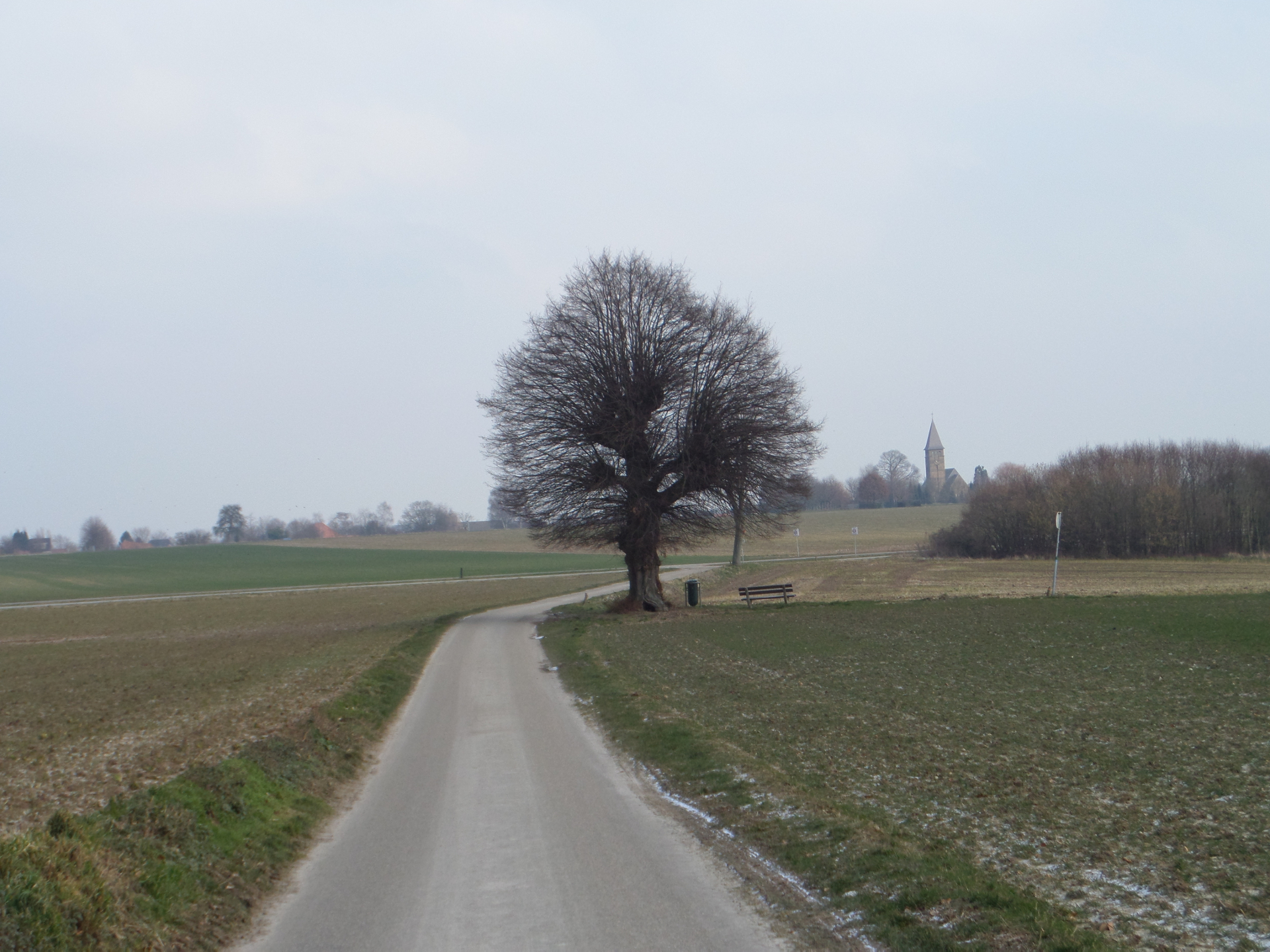 Veldweg in het Stammenderveld (gemeente Schinnen) met uitzicht op de kerk van Puth.